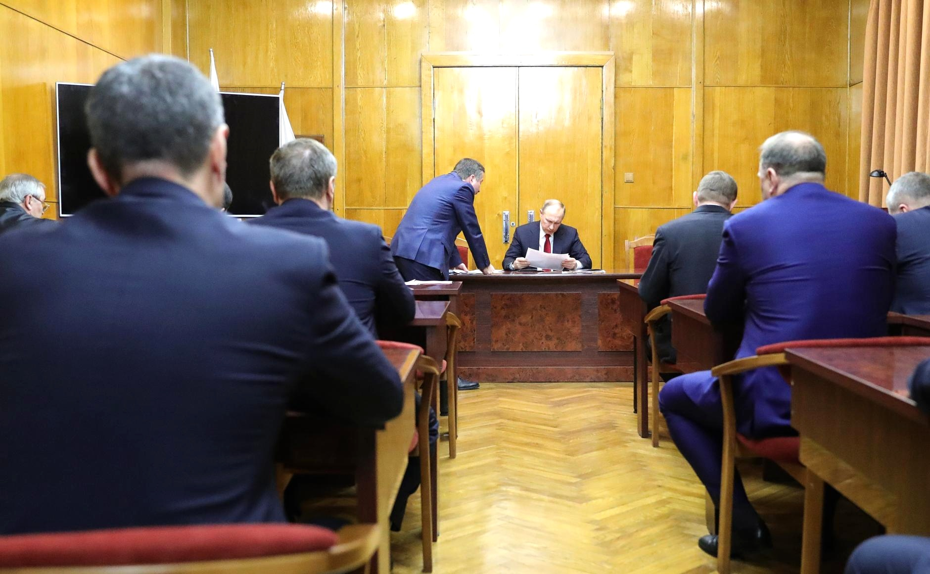 Президент России Владимир Путин заслушал доклады спецслужб о предварительных результатах расследования взрыва в метро Санкт-Петербурга. Управление ФСБ по городу Санкт-Петербургу и Ленинградской области